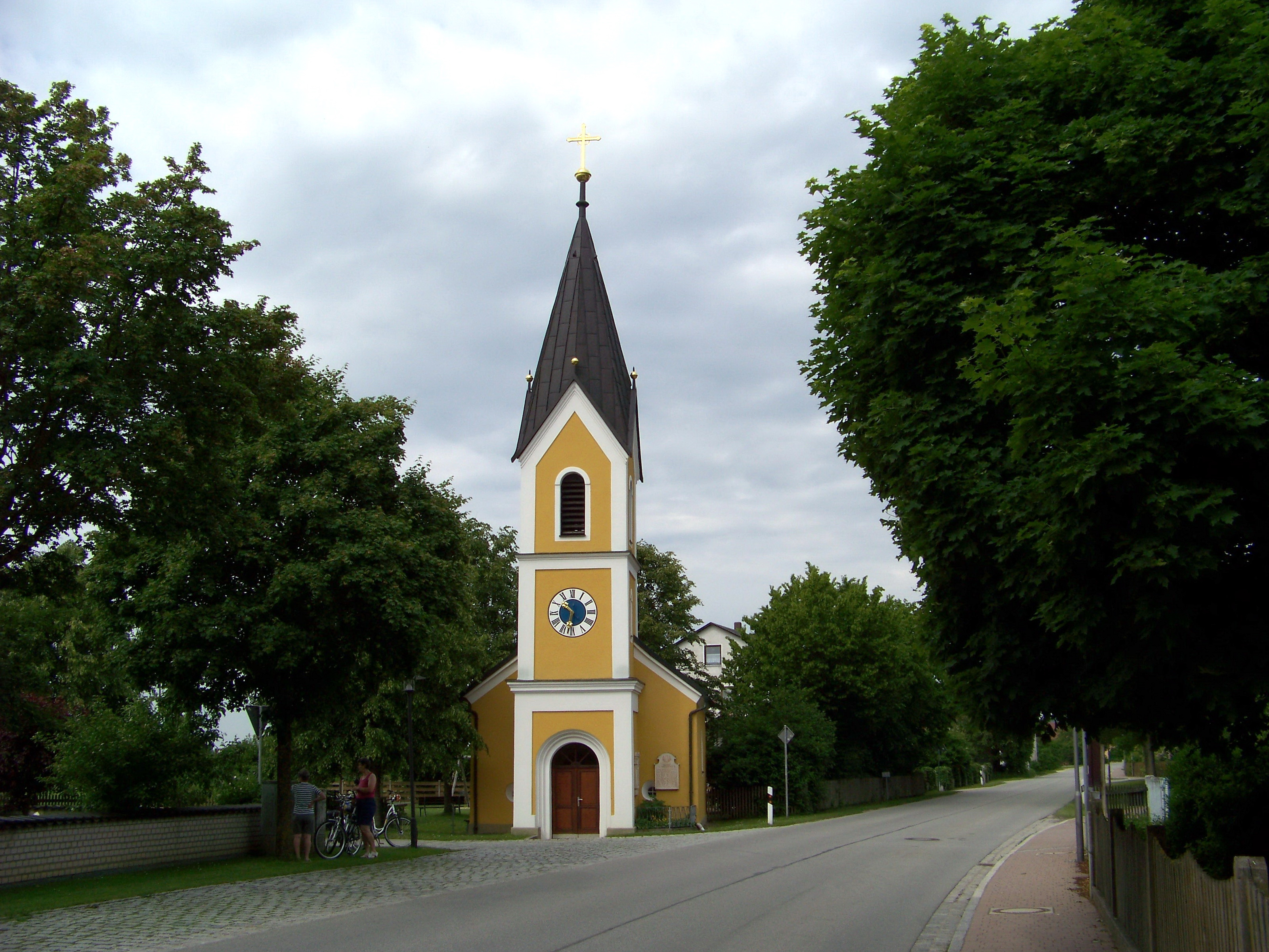 Wiesent. Kruckenberg 35. Kath. Filialkirche St. Matthäus, Saalbau mit abgewalmtem Satteldach und Fassadenturm mit Spitzdach, klassizistisch, 1845; mit Ausstattung.